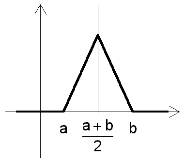 Rappresentazione grafica della funzione di densità di probabilità della variabile casuale di Simpson. Grafico prodotto con R e successivamente manipolato con GIMP. Categoria:Variabili casuali